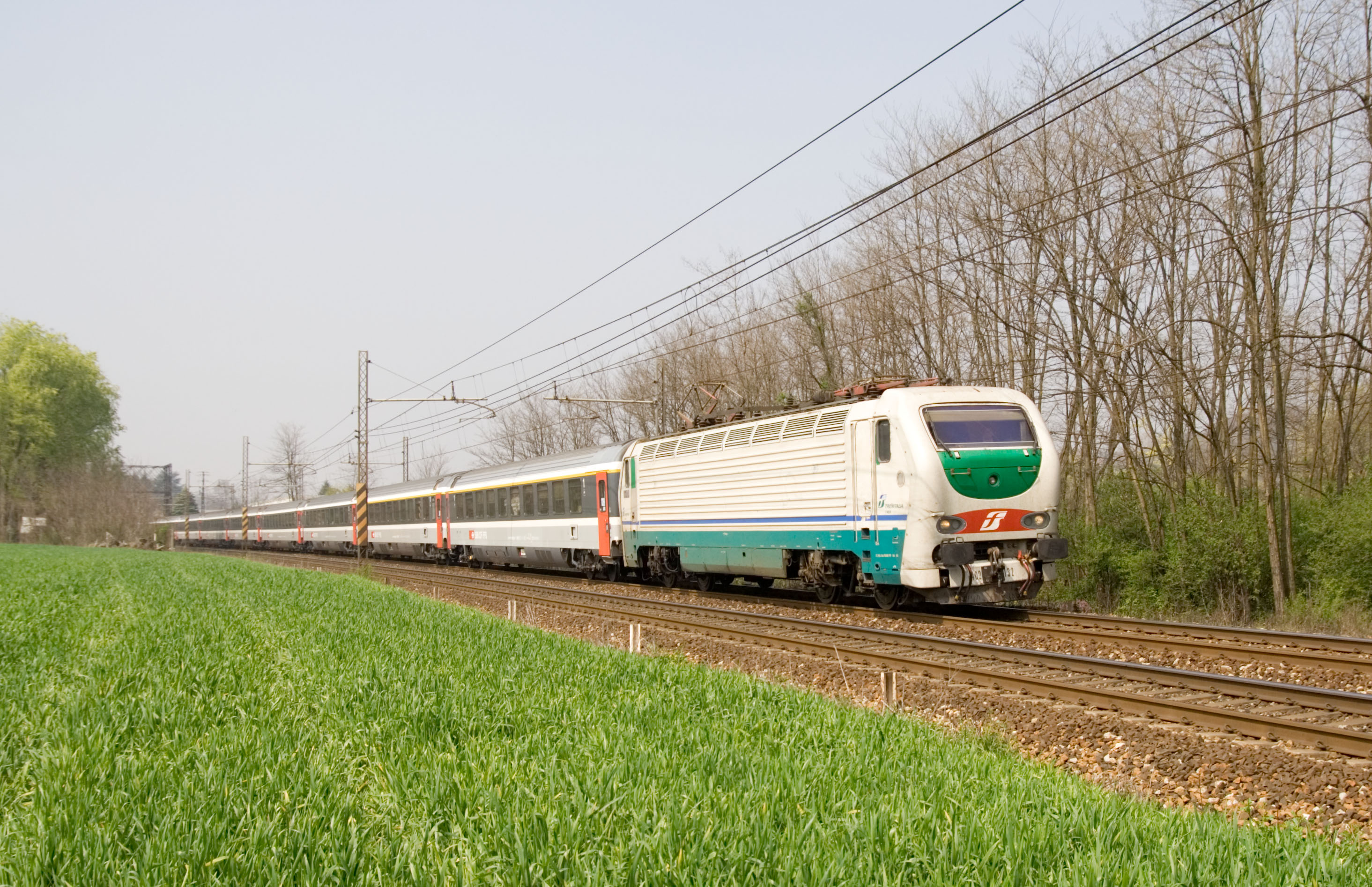 Treno EuroCity trainato da una locomotiva elettrica E.402 B di Trenitalia, in corsa presso Carimate